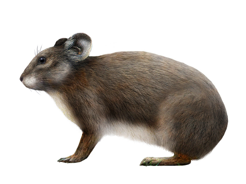 Ricostruzione in vita di Prolagus sardus, lagomorfo quaternario del massiccio Sardo-Corso.